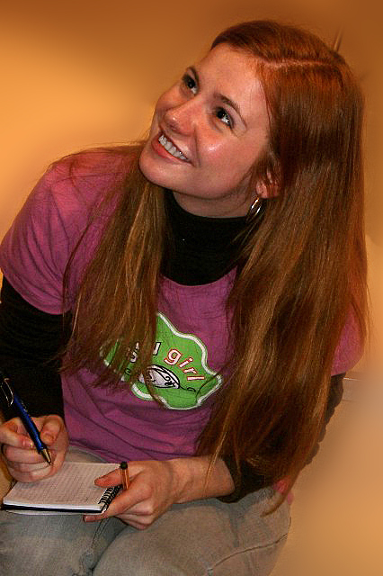 Josi schreibt Autogramme